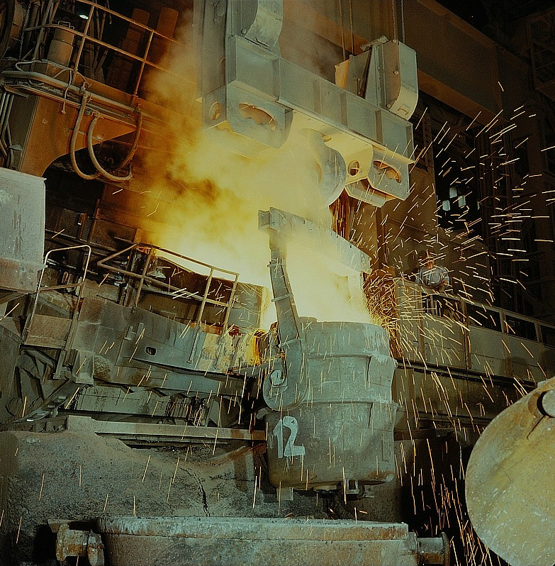 Original image description from the Deutsche Fotothek Metallurge für Hüttentechnik